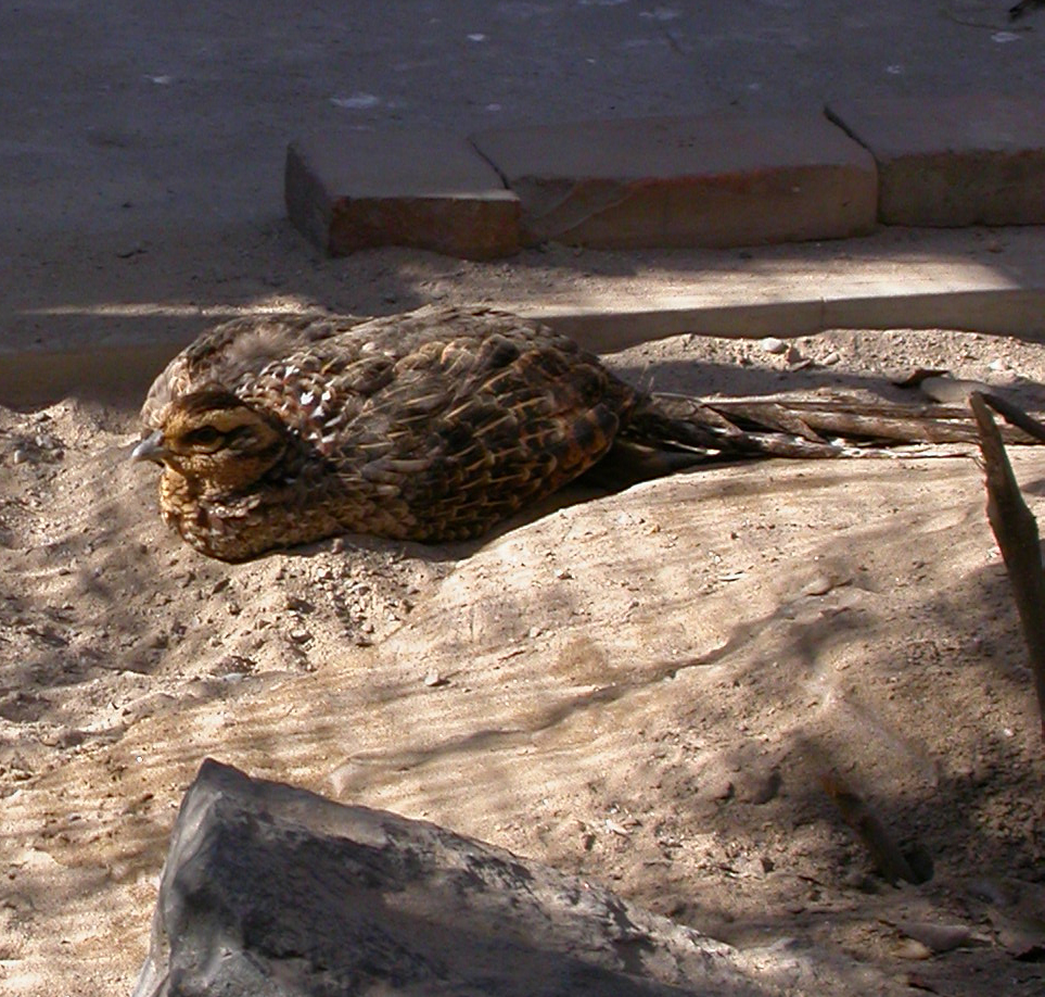 在进行沙浴的白腹锦鸡雌鸟，摄于北京动物园，自己拍